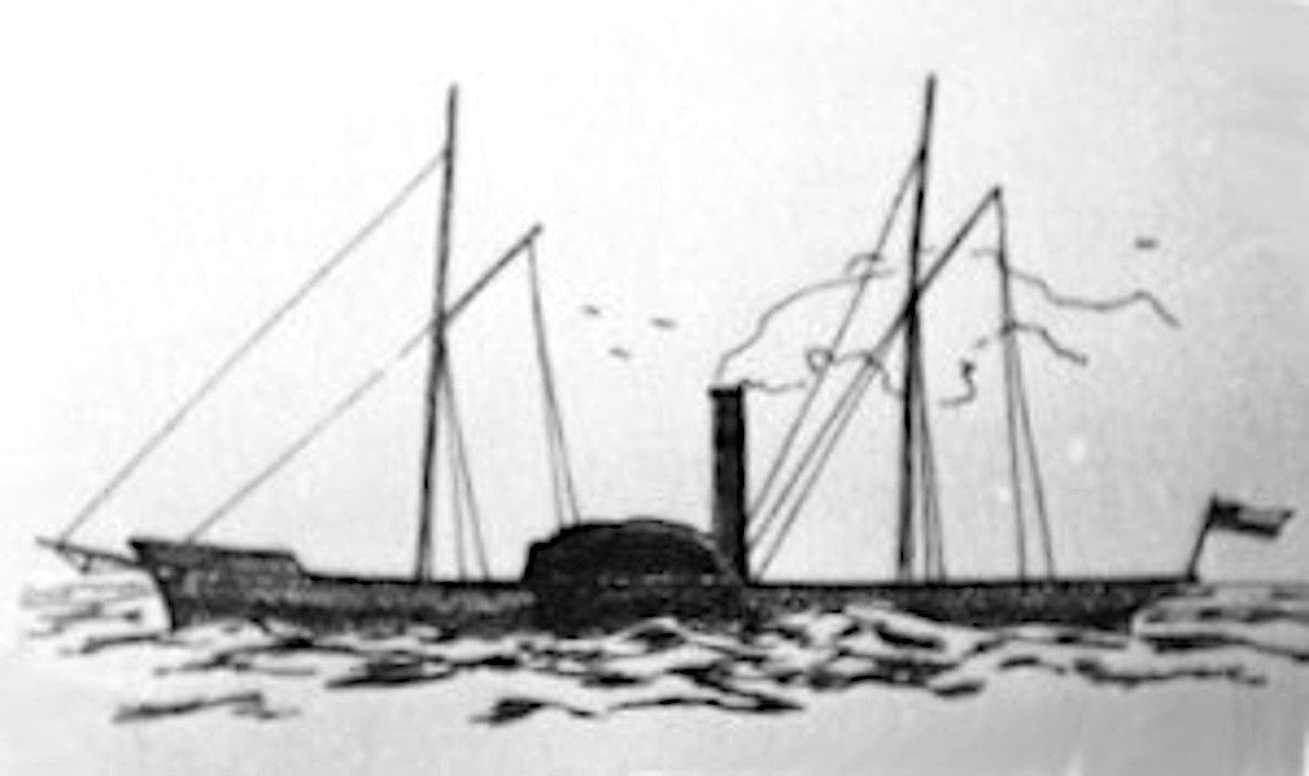 Paquebot "Paquete del Maule" - Chile